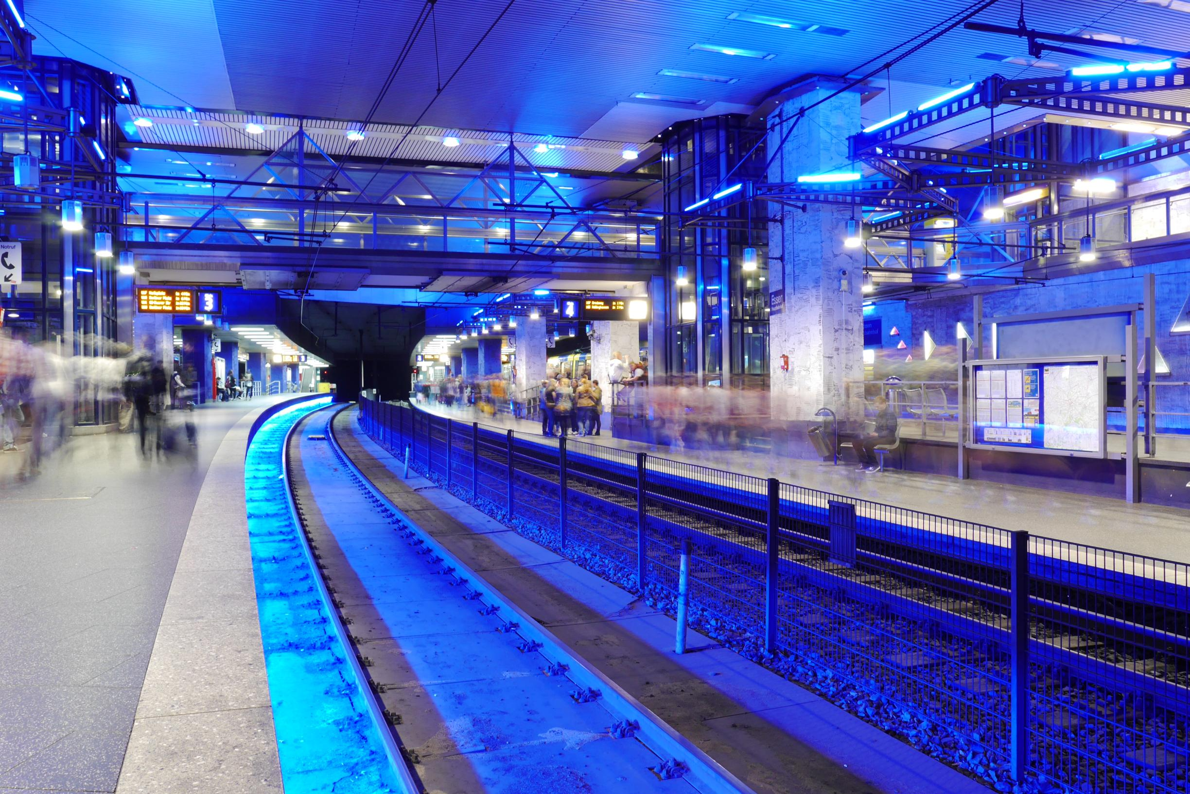 U-Bahnhof des Essener Hauptbahnhofs.